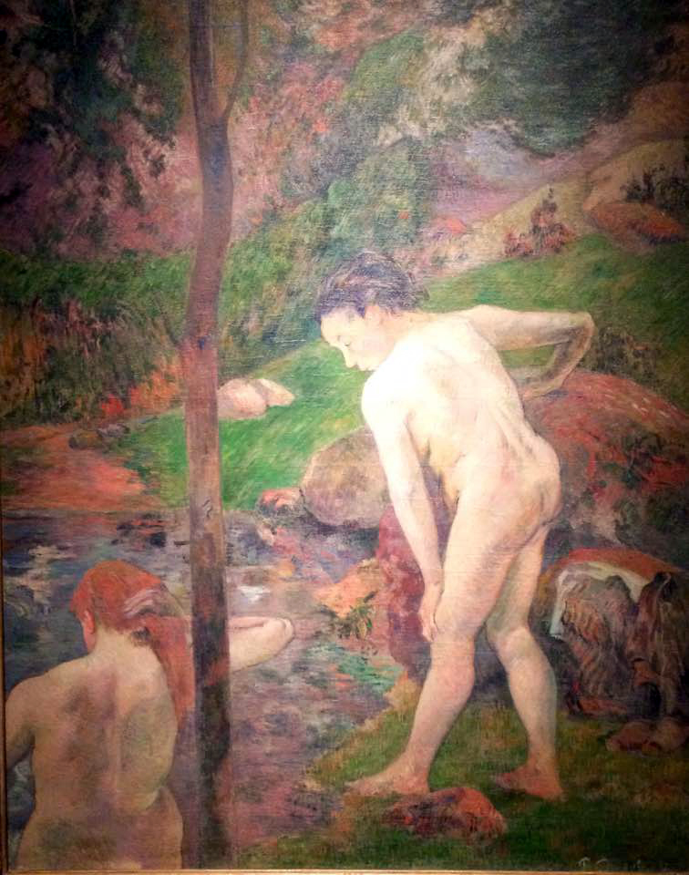 La Baignade ou Deux Baigneuses, tableau de Paul Gauguin peint en 1887 à Pont-Aven (Finistère), exposé au Musée national des Beaux-Arts de Buenos Aires (Argentine).